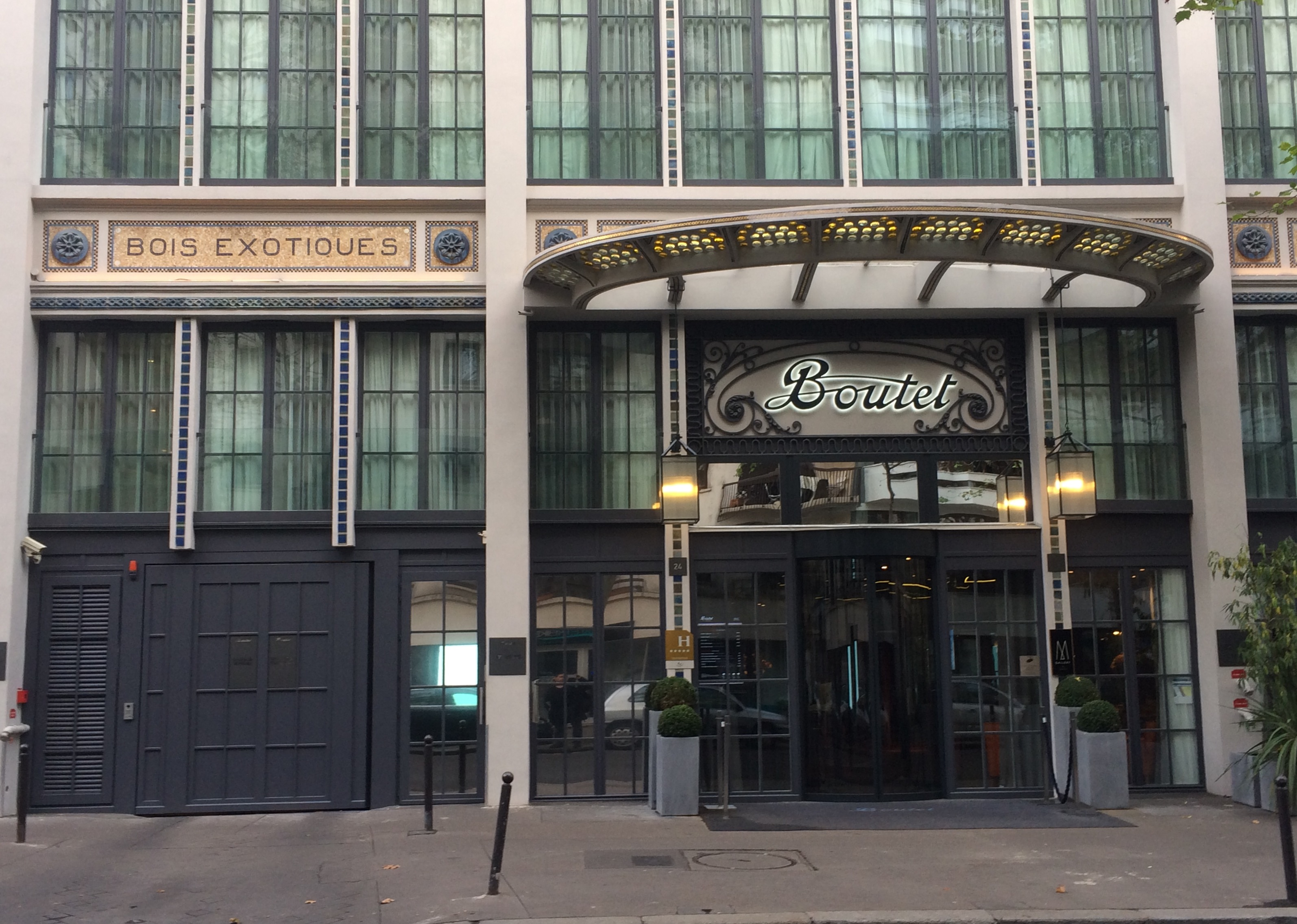 Entrée de l'Hôtel Boutet, 24 rue Faidherbe à Paris, en novembre 2016